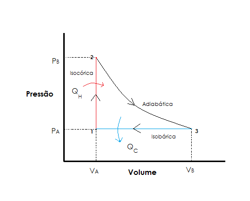 Diagrama Pressão x Volume do ciclo térmico de Lenoir, onde se apresenta duas retas, uma isobárica e outra isocórica, além de uma curva adiabática.